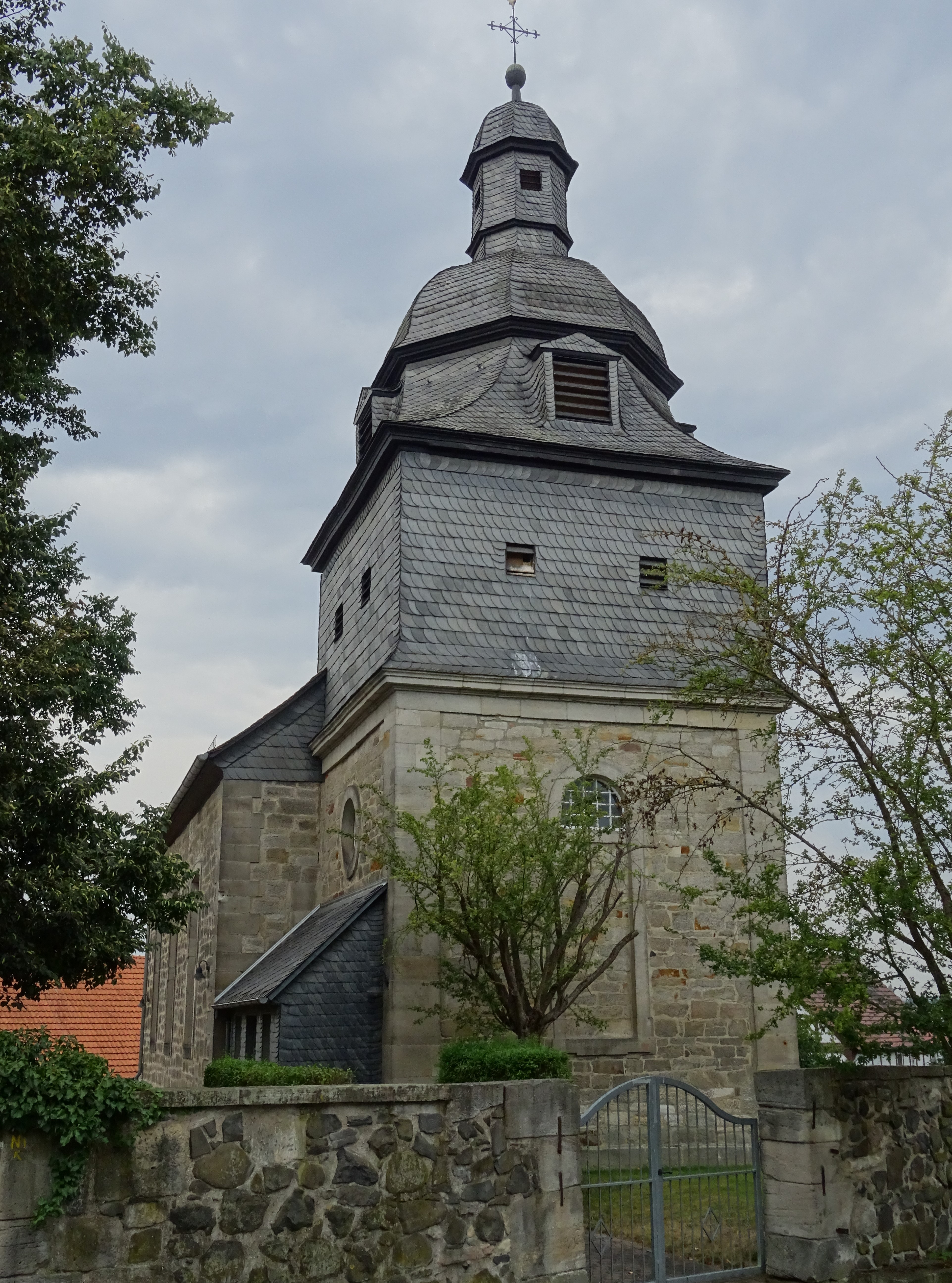 Kirchengebäude